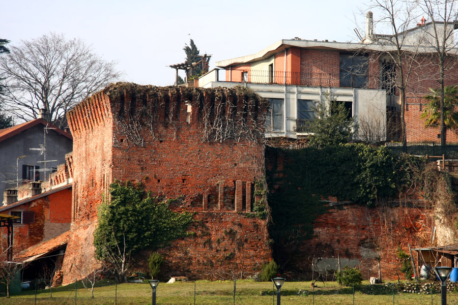 Resti delle mura e dei bastioni intorno al centro storico di Oleggio (NO)